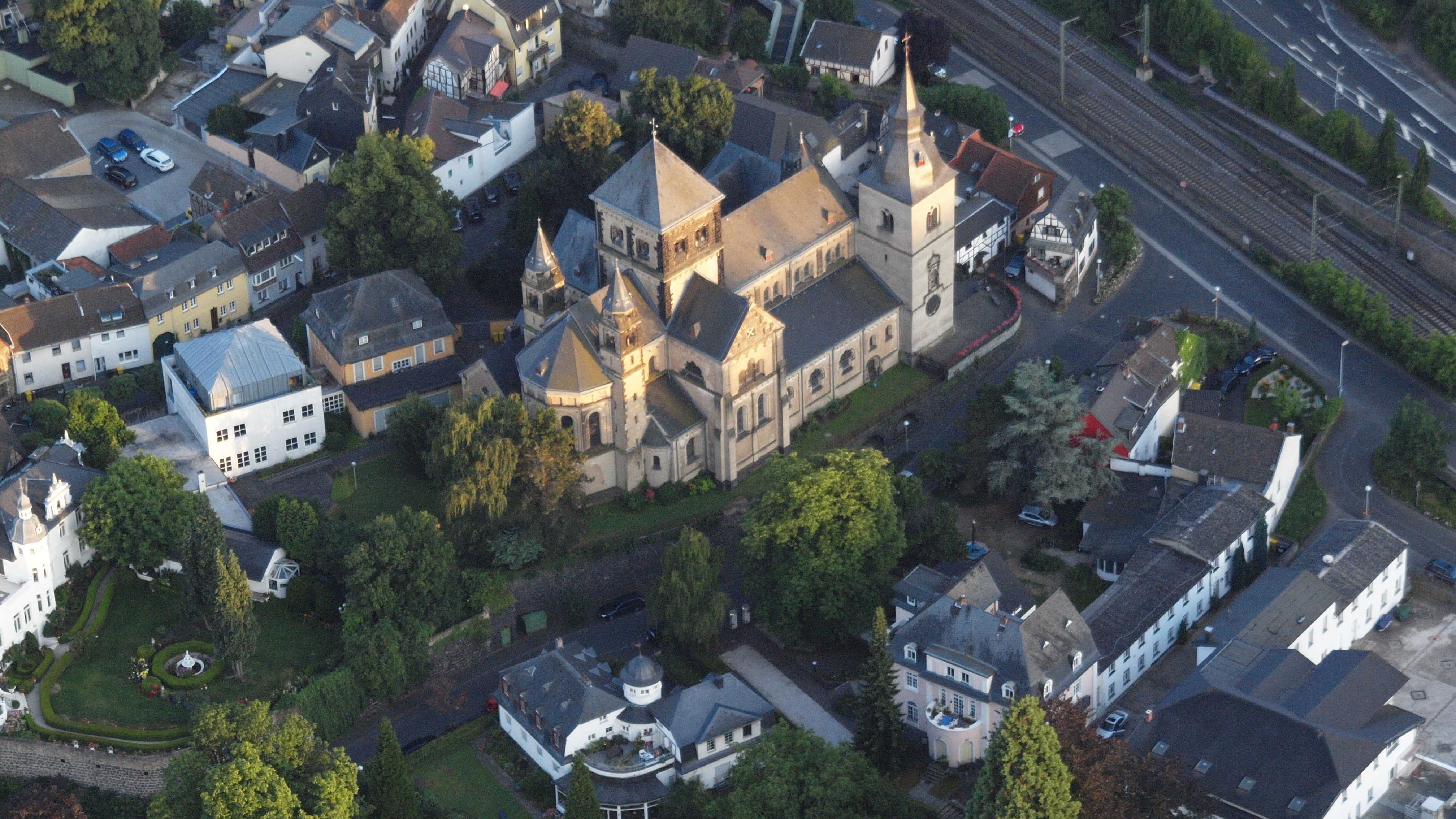 St. Peter und Paul, Remagen: Luftaufnahme